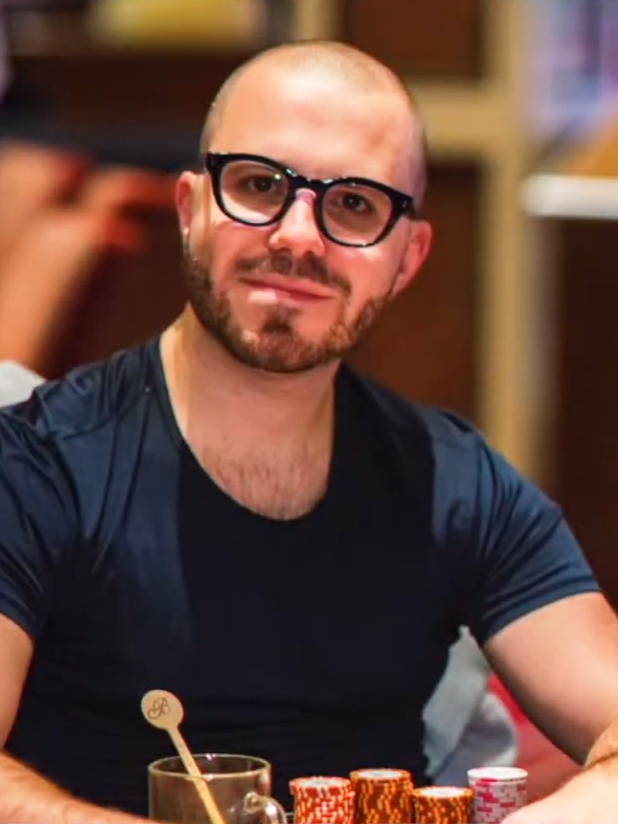 Dan Smith beim WPT Five Diamond World Poker Classic